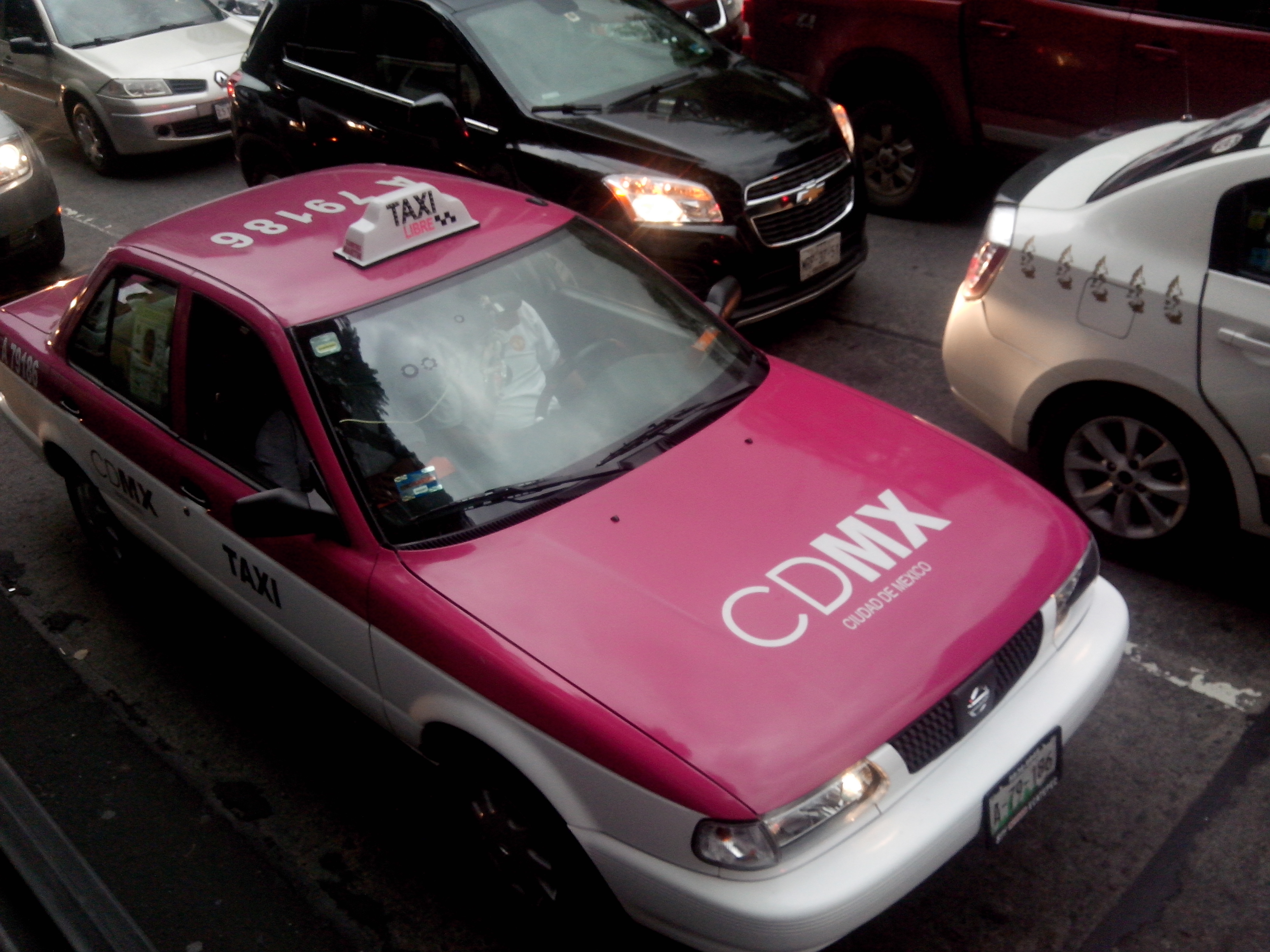 Nueva cromática 2014.